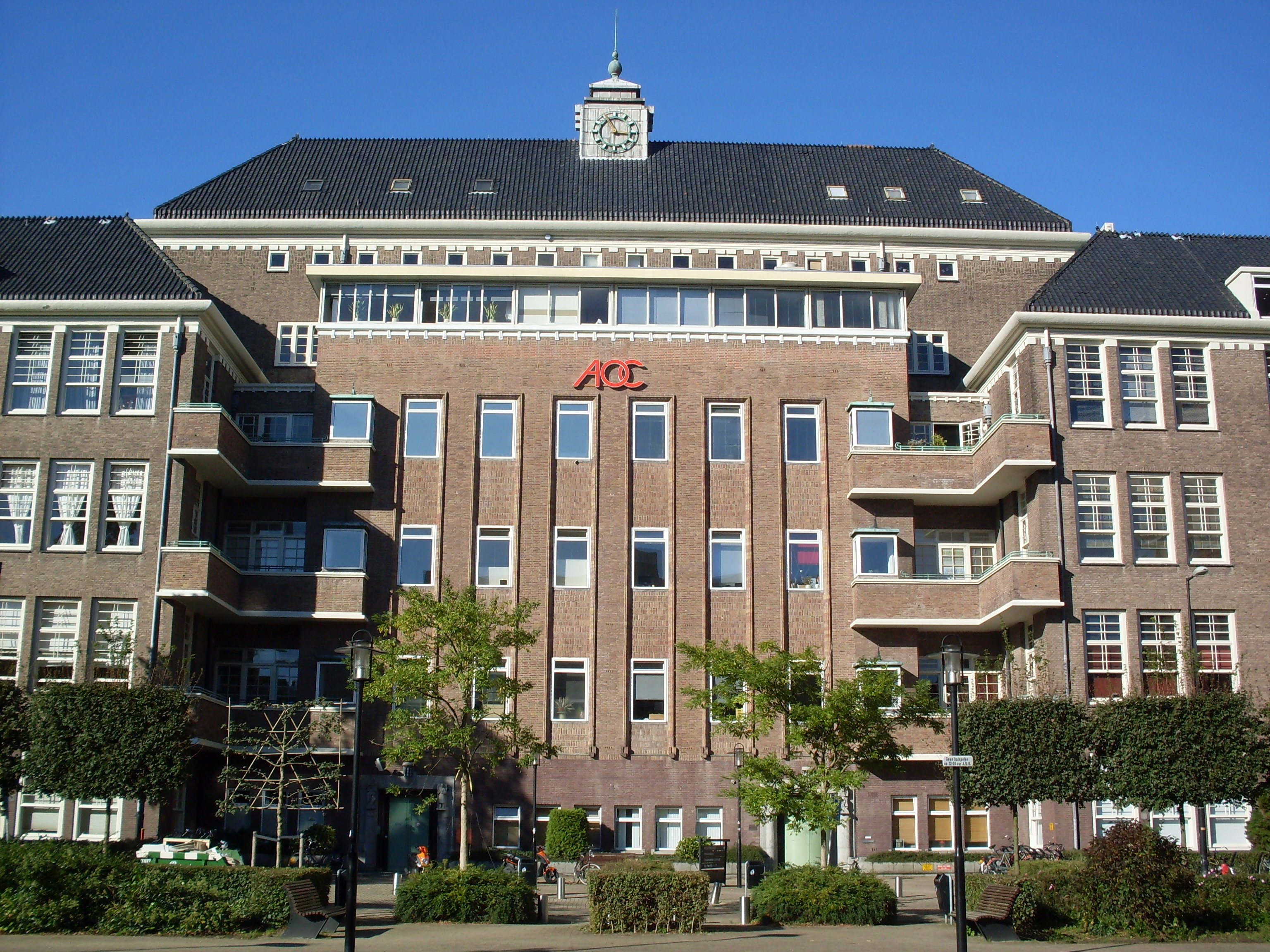 WG-plein 100, vm. Wilhelminagasthuis te Amsterdam.